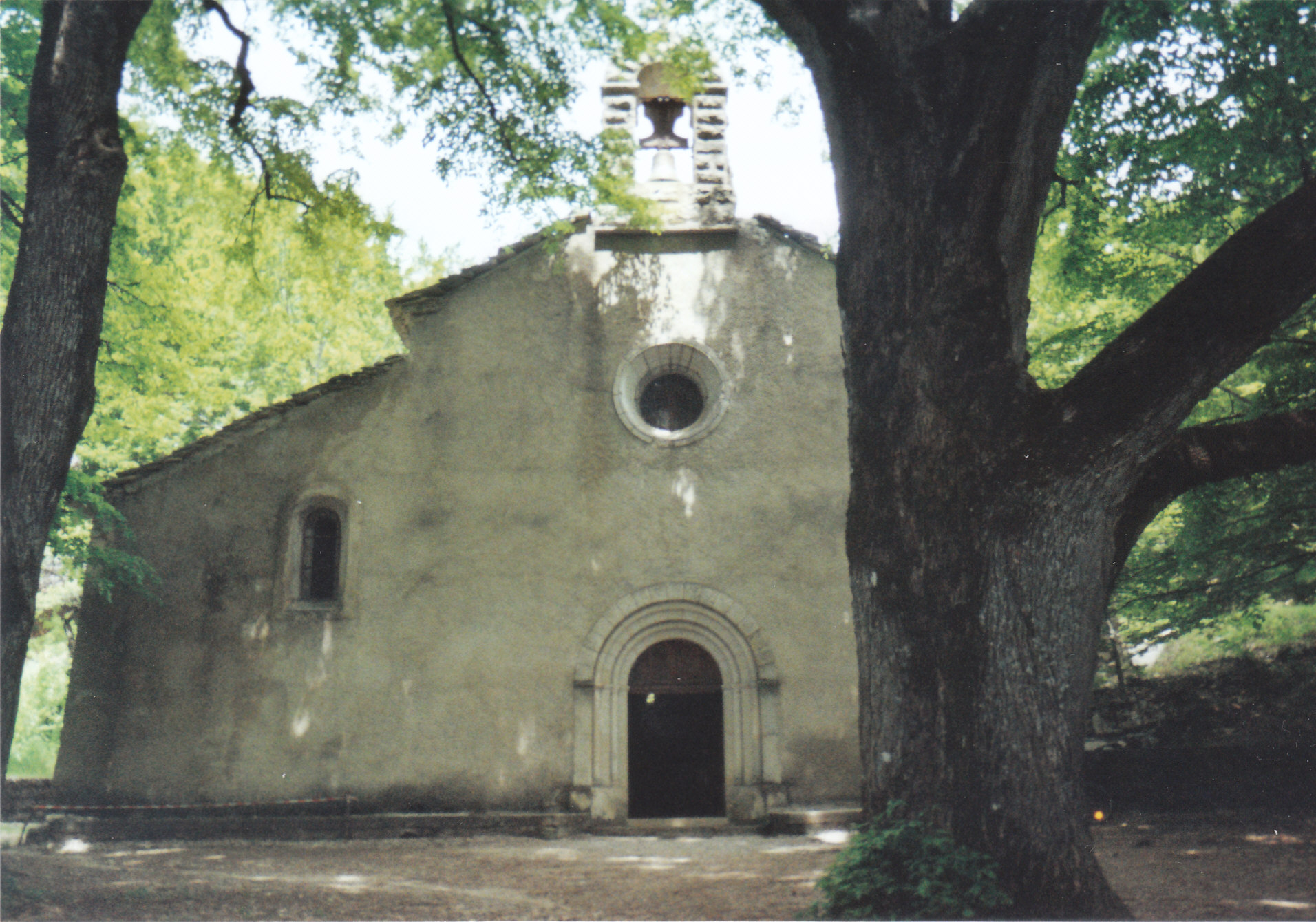 Abbaye Notre-Dame de Lure